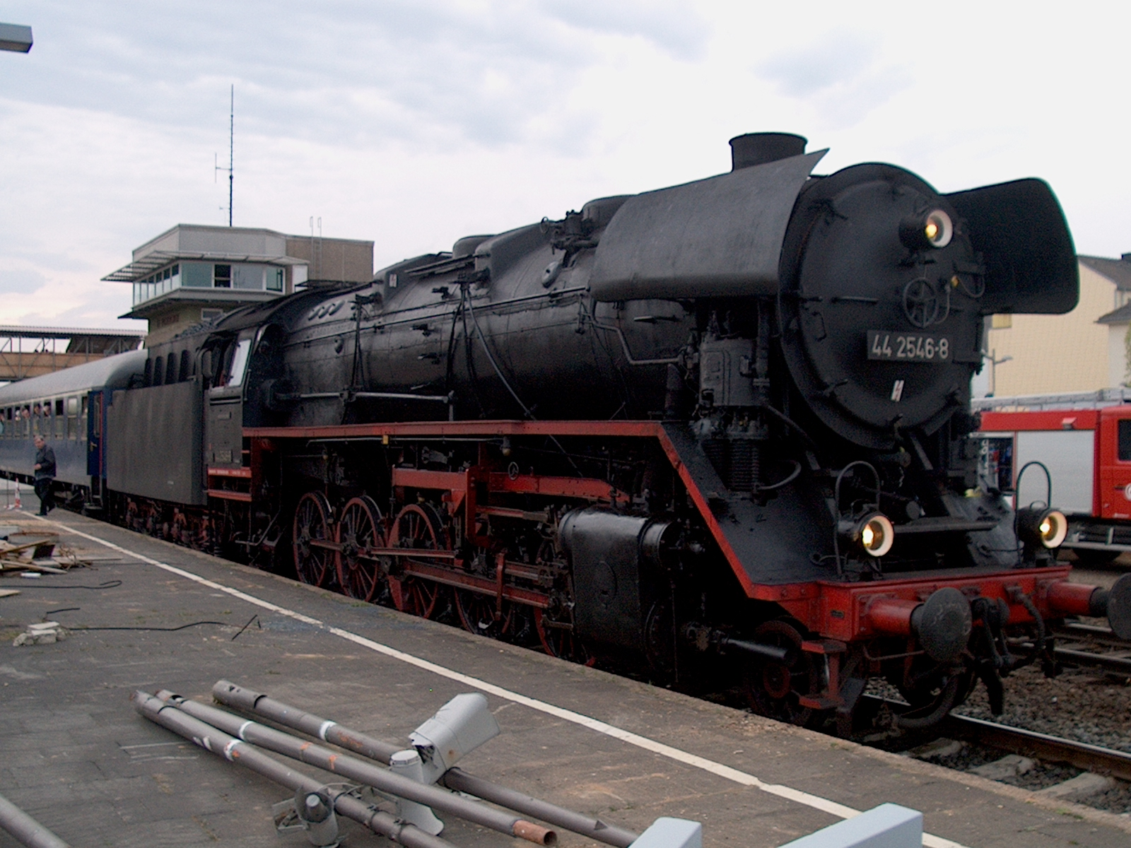 Baureihe 44 am 25. April 2010 in Euskirchen